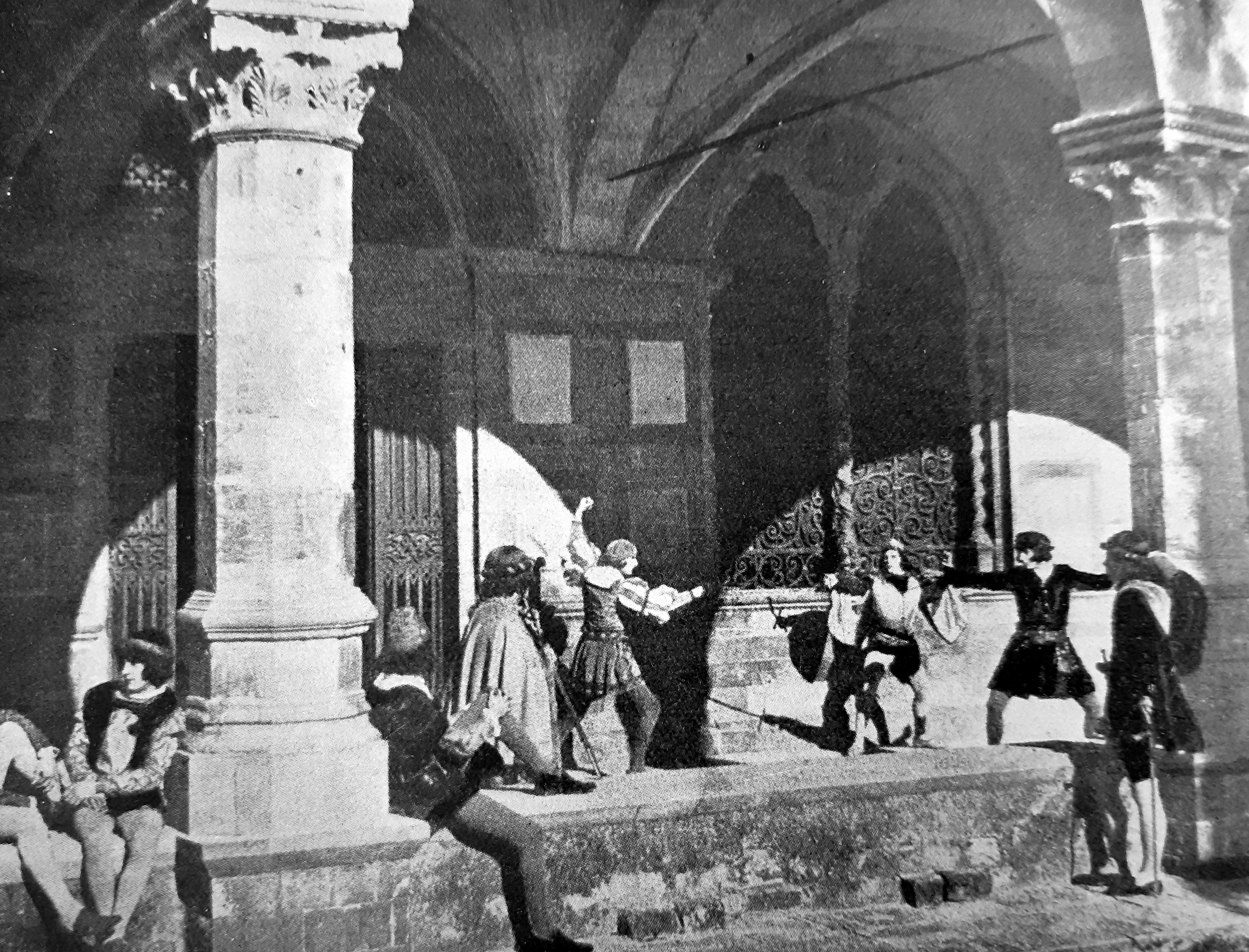 Fotogramma de I Foscari, regia di Mario Almirante, prod Alba, Roma, 1923